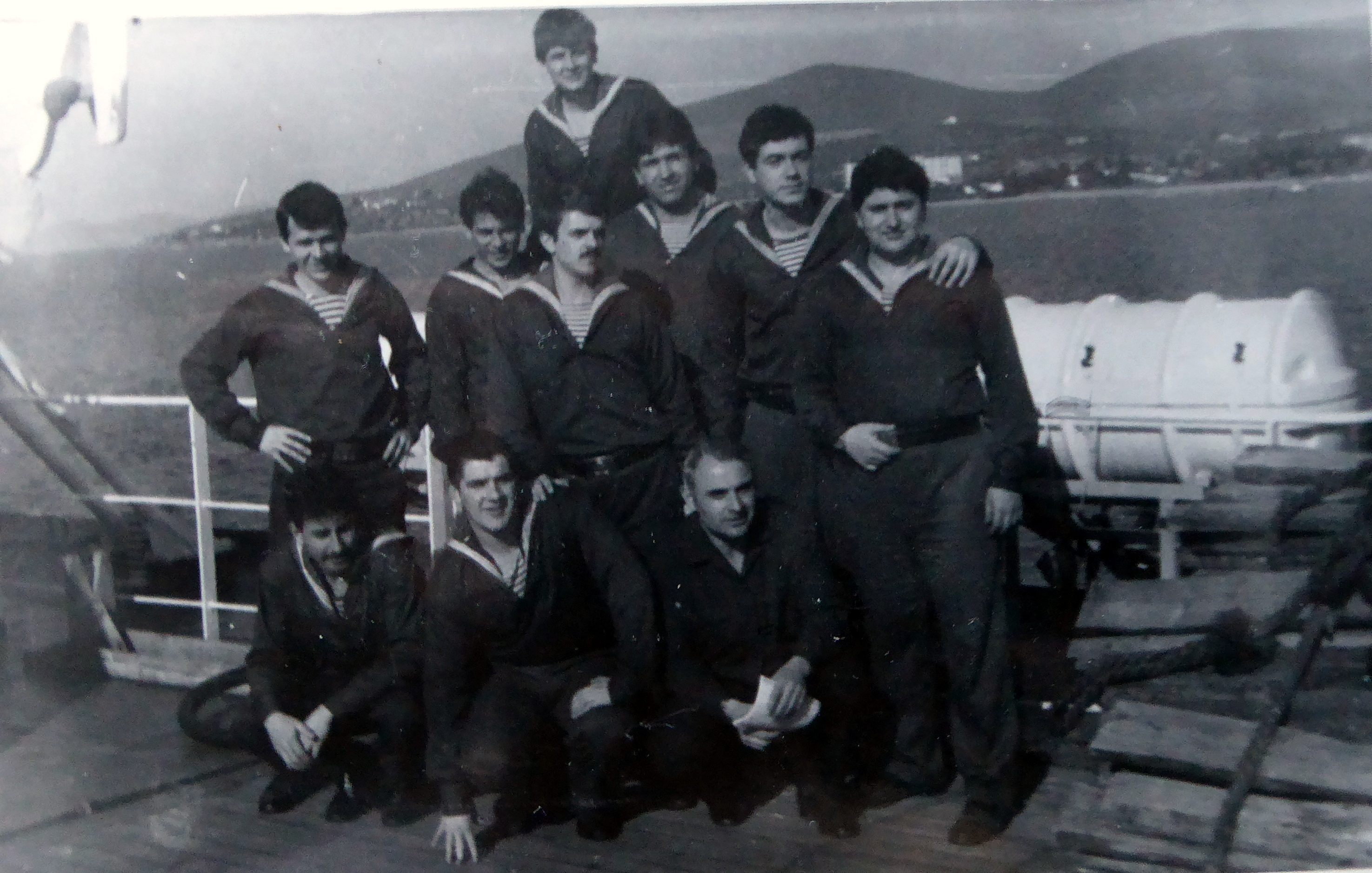 Schulschiff Vaptsarov am Bosphorus, Diplom-Ingenieur A. Totchkov mit Kadetten